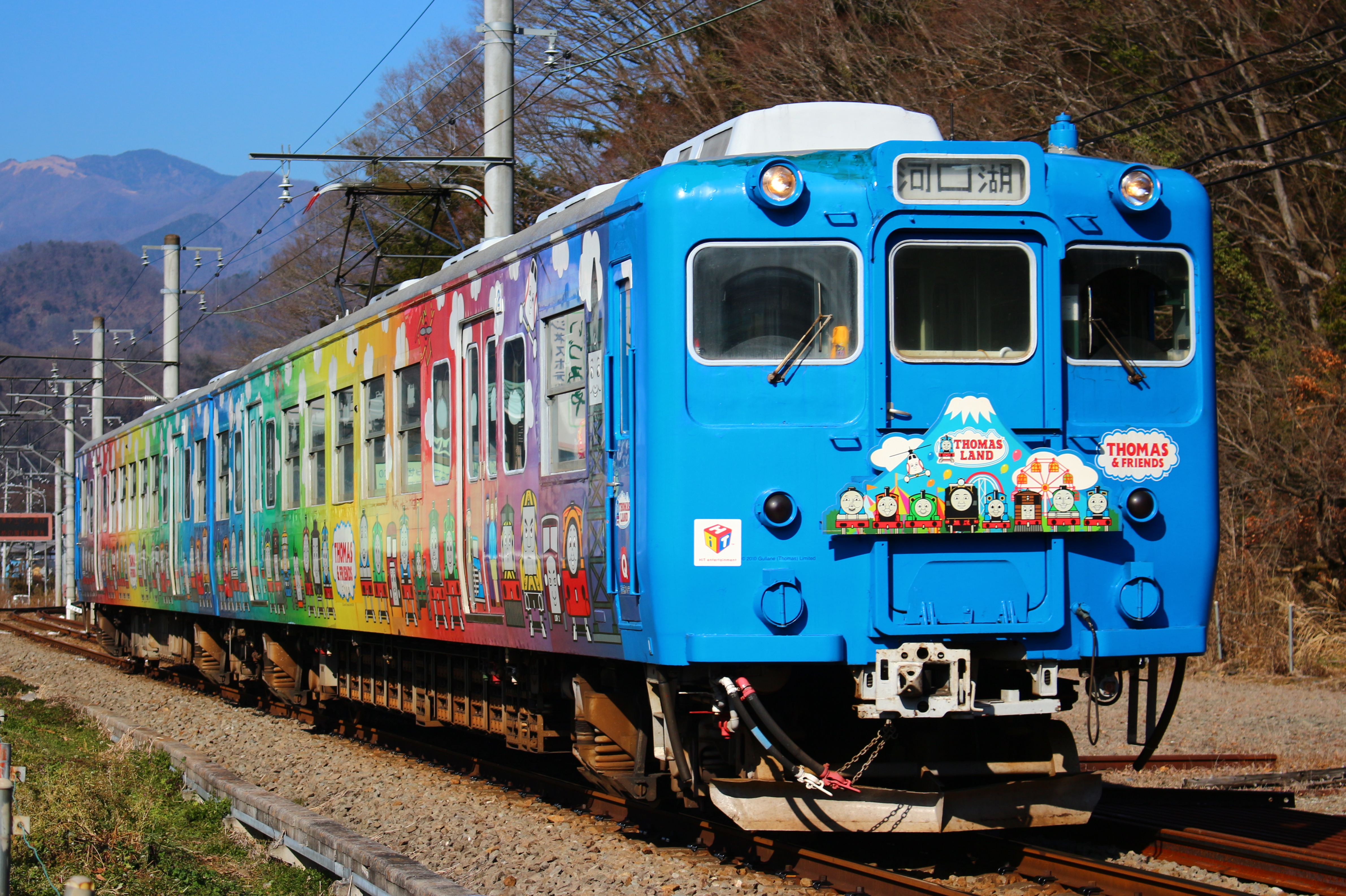 富士急行5000形電車（トーマスラッピング）